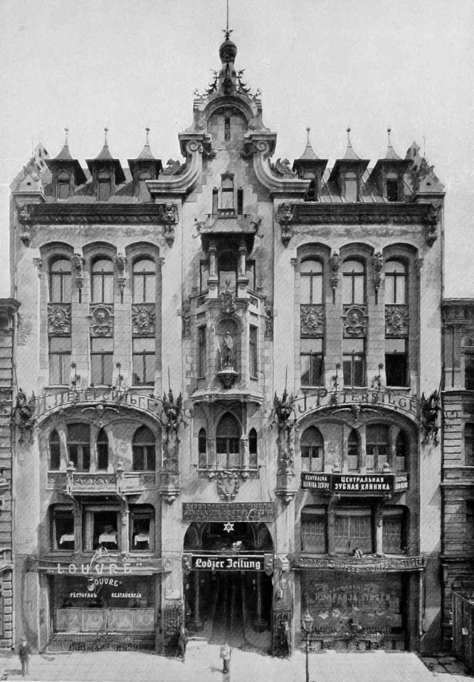 Piotrkowska 86 w 1913 roku wydawca „Lodzer Zeitung“